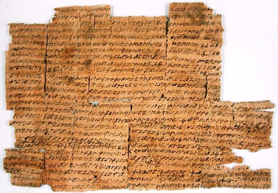 Греко-армянский папирус